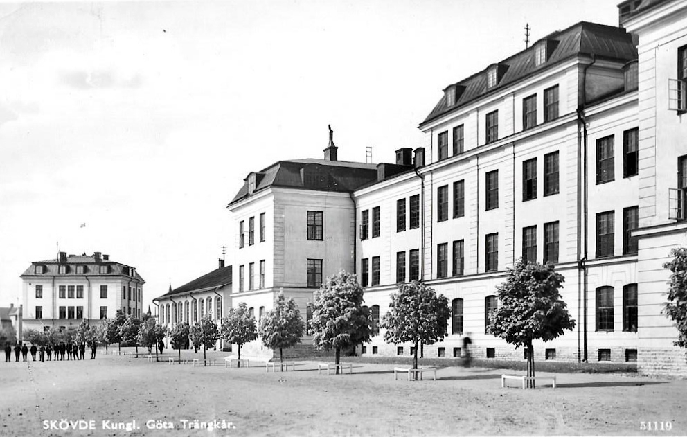 Göta trängkårs före detta kasern samt kanslihus vid Högskolevägen i Skövde.